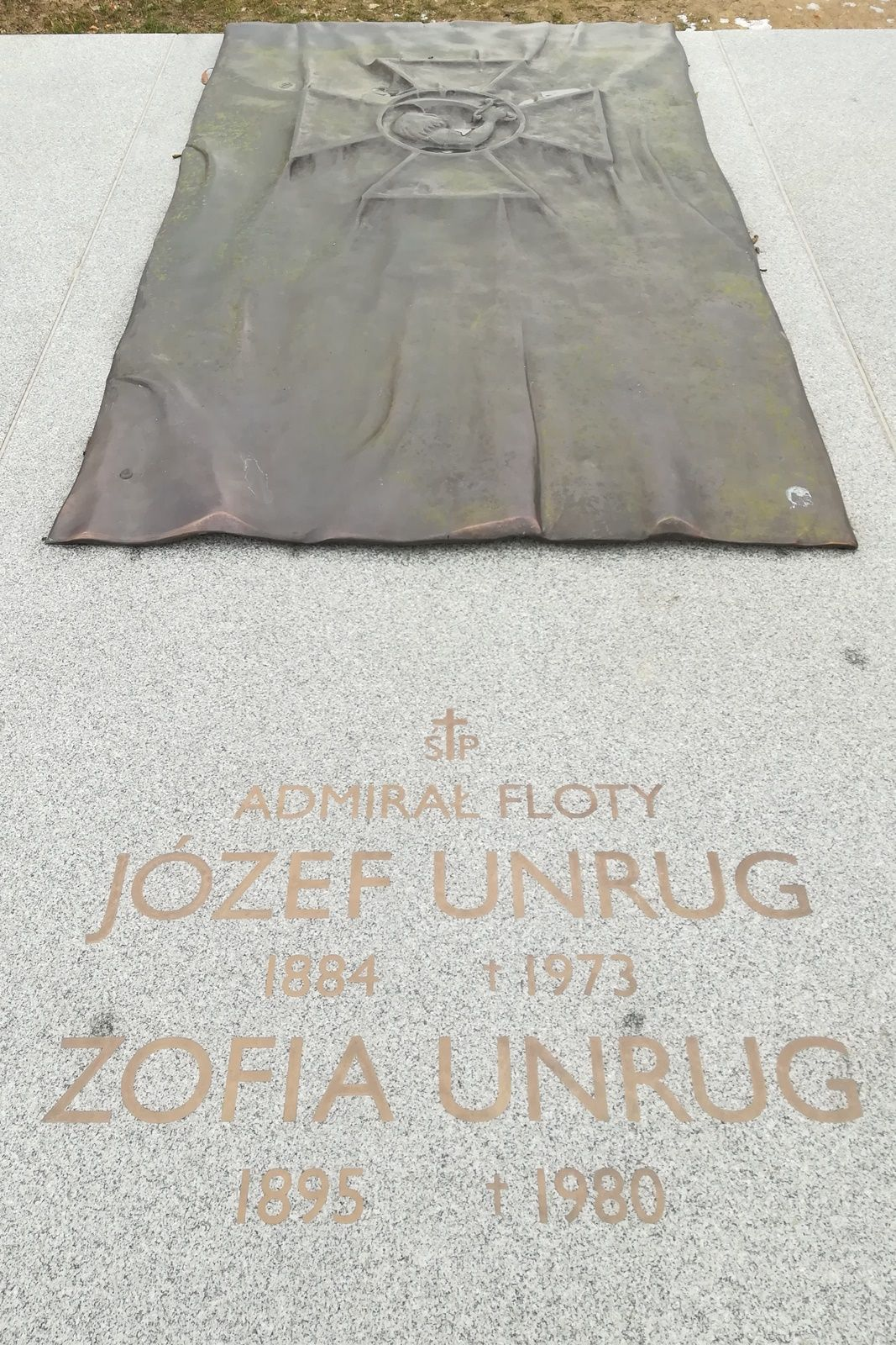 Cmentarz Marynarki Wojennej_Kwatera Pamięci_Admirał_floty_Unrug_1